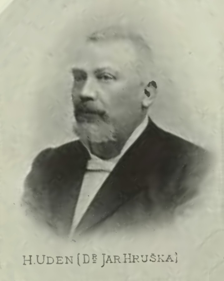 Portrét – H. Uden (1847 - 1930), Český lékař, politik a spisovatel.